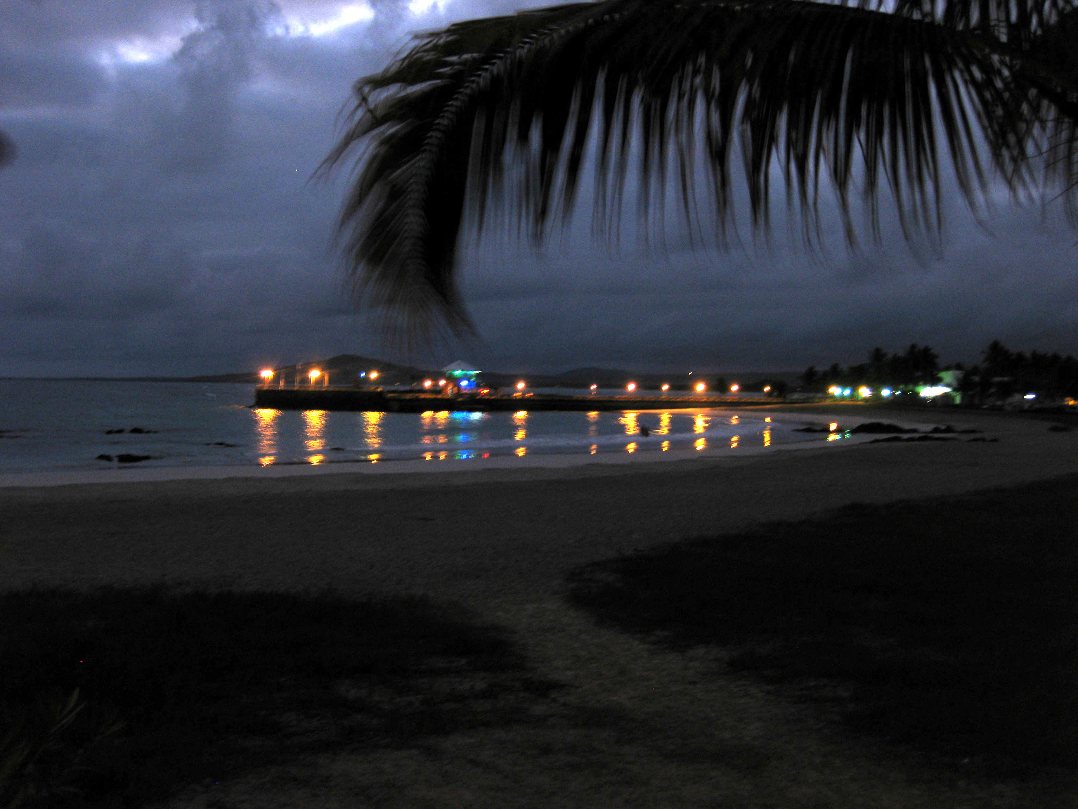 La Casa de Marita, Isabela Island, Galapagos